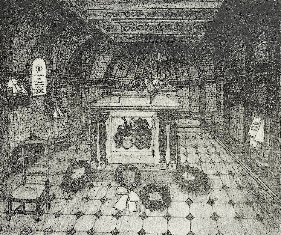 Inneres der Sarolta-Kapelle in Fränkisch-Crumbach, Untergeschoss: Gruft für Sarolta Batthyány von Németh-Ujvár († 1892). Zeichnung entstanden zwischen Einweihung des Mausoleums 1892 und Veröffentlichung der Stocker-Chronik 1895. Reprod. in Carl Wilhelm Friedrich Ludwig Stocker: Familien-Chronik der Freiherrn von Gemmingen, Heidelberg 1895, Bildtafel zw. S. 296 und 297.